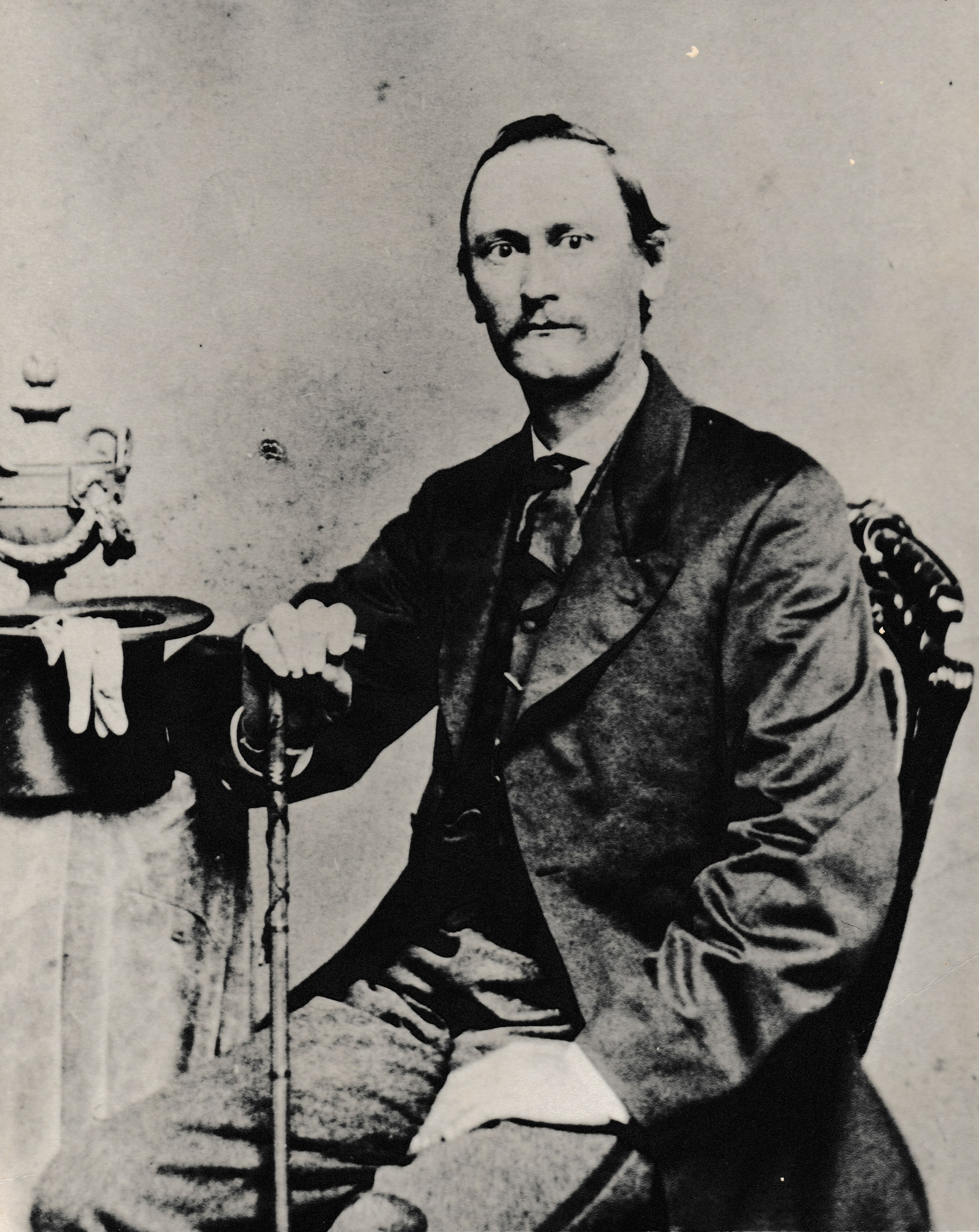 Albert Lybrock